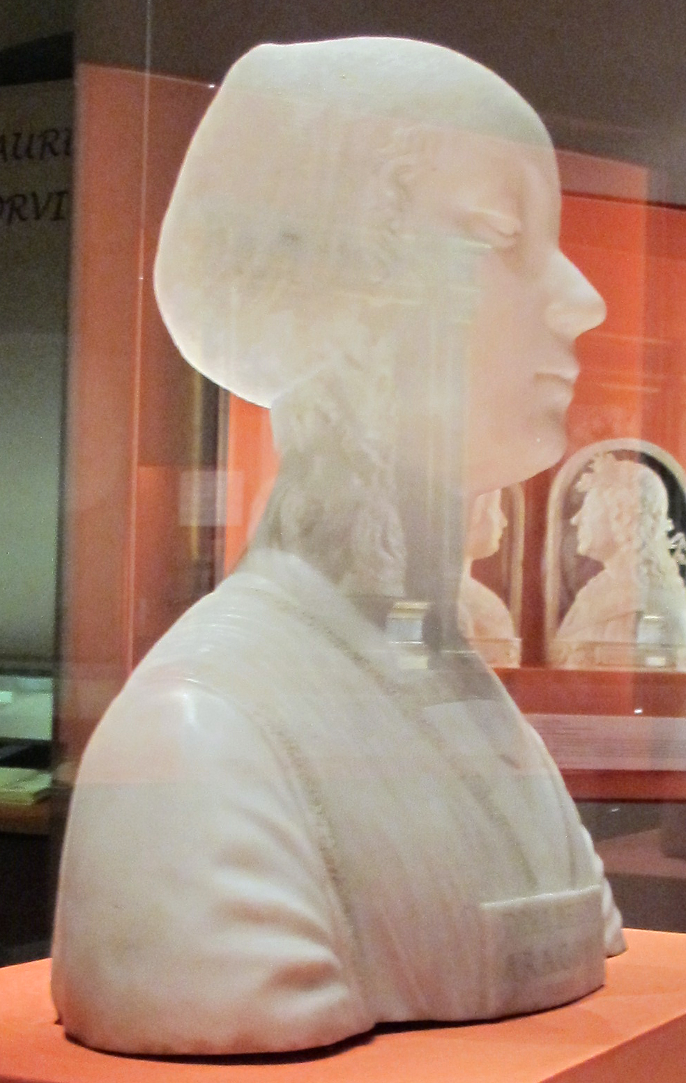 San Miniato al Monte, Firenze